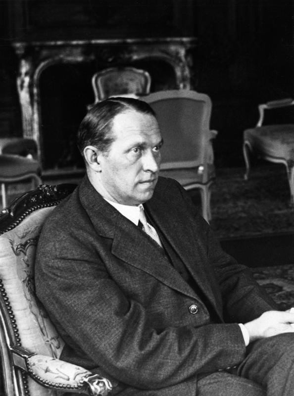 Dovas Zaunius (1892 m. birželio 19 d. Rokaičiuose, Gumbinės valsčius, Lankos apskritis – 1940 m. vasario 22 d. Kaune) – teisininkas, Mažosios Lietuvos politinis veikėjas, Lietuvos diplomatas, Lietuvos užsienio reikalų ministras.